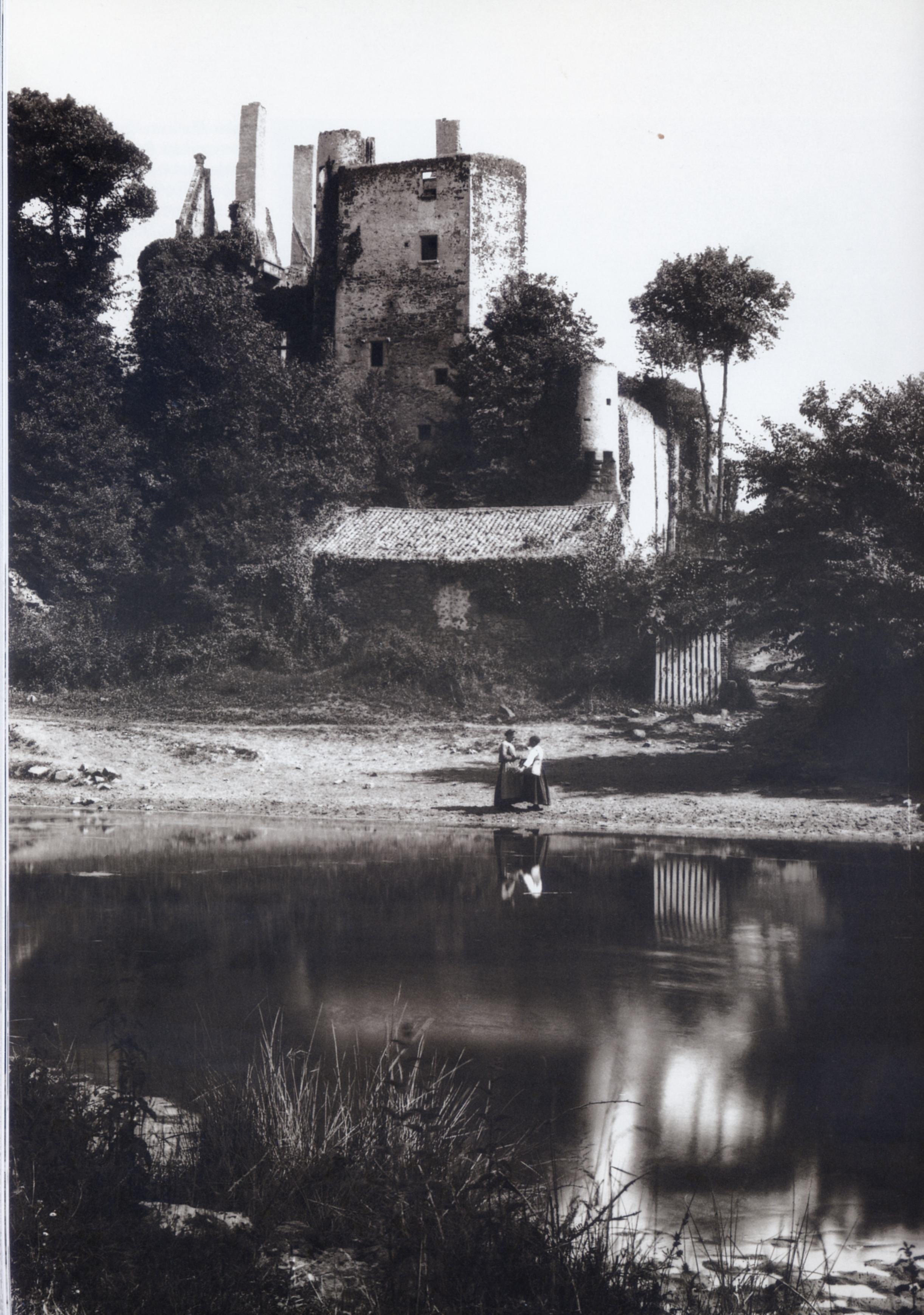 Le château de Glénay vu depuis la rive du Thouaret